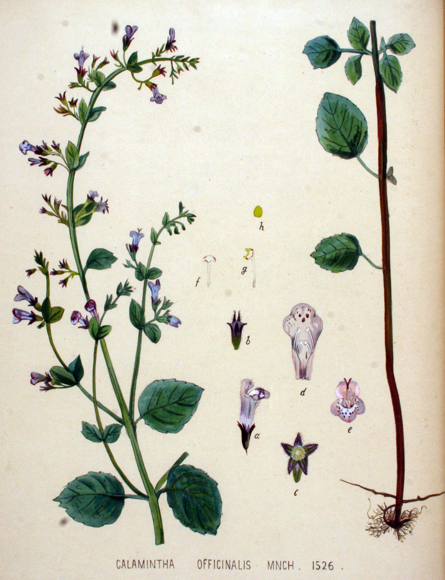 Calamintha nepeta L. subsp. spruneri (Boiss.) Nyman (Syn. Calamintha officinalis Moench)